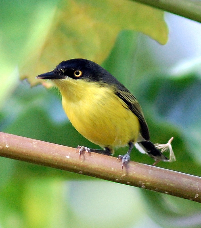 Todirostrum cinereum No quintal da casa da minha sogra em Registro-SP